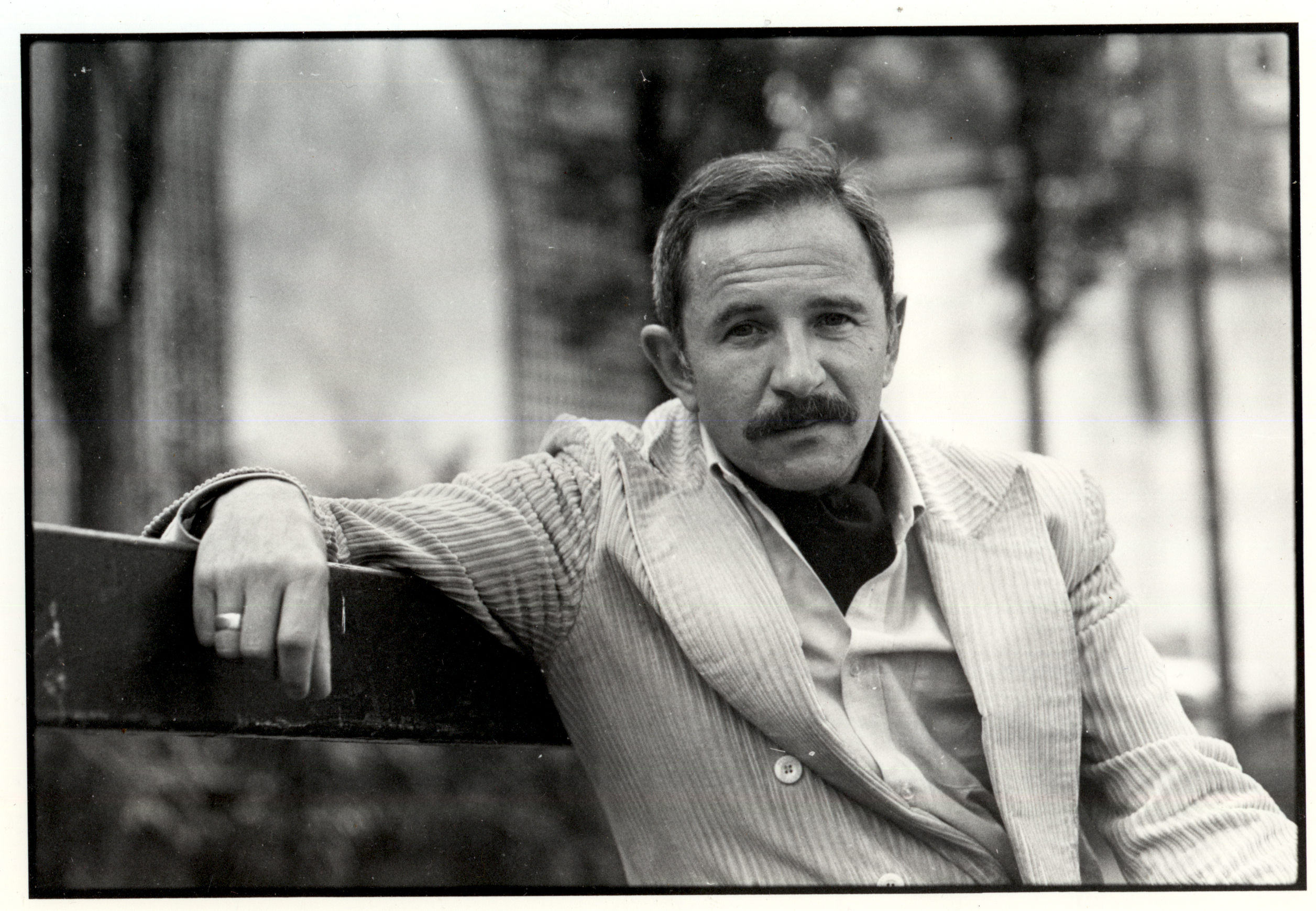 Conrad Detrez (1937-1985), écrivain francophone de nationalité belge, ancien étudiant à l’Université catholique de Louvain.